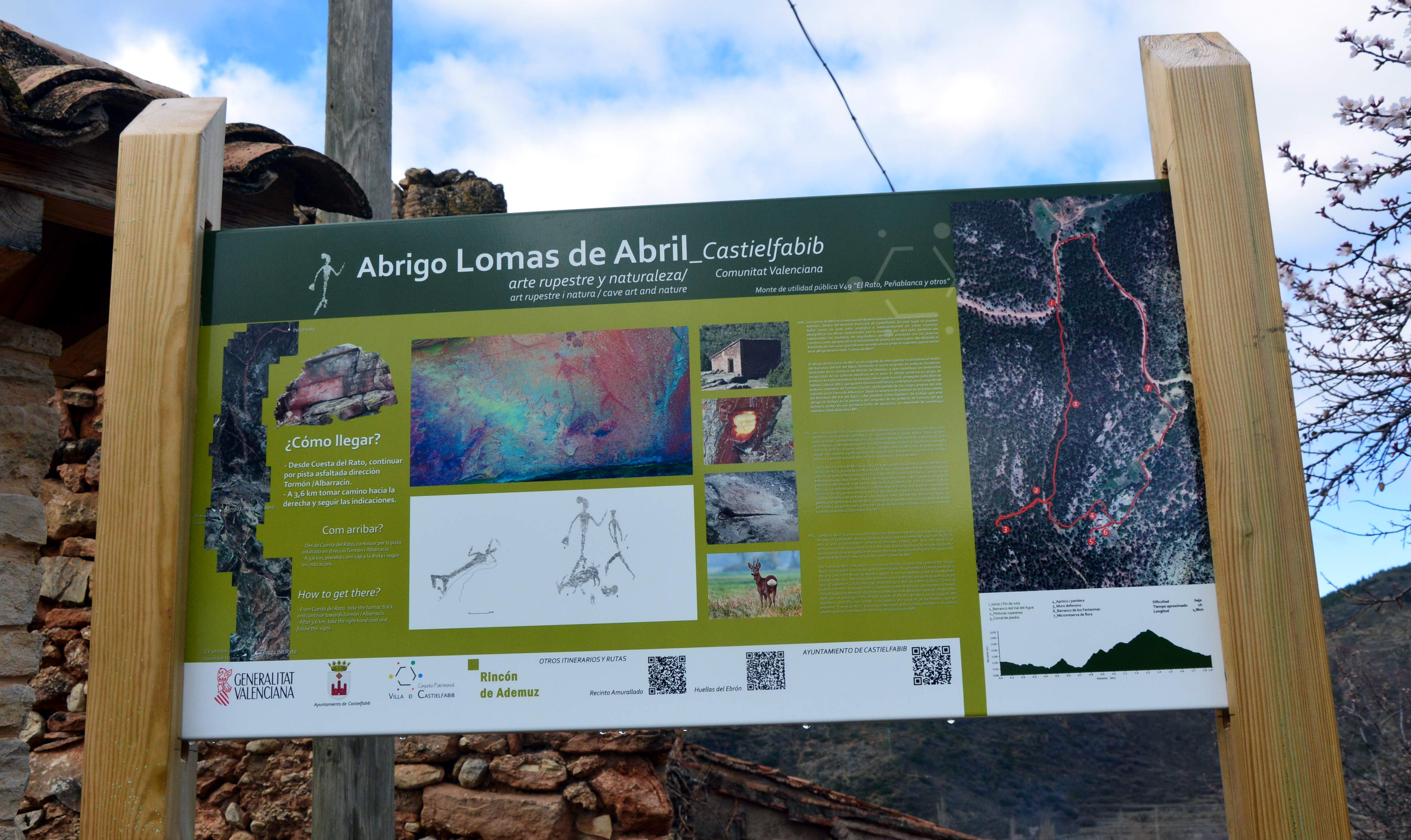 Detalle de panel relativo al abrigo Lomas de Abril en Cuesta del Rato, Castielfabib (Valencia), 2018.